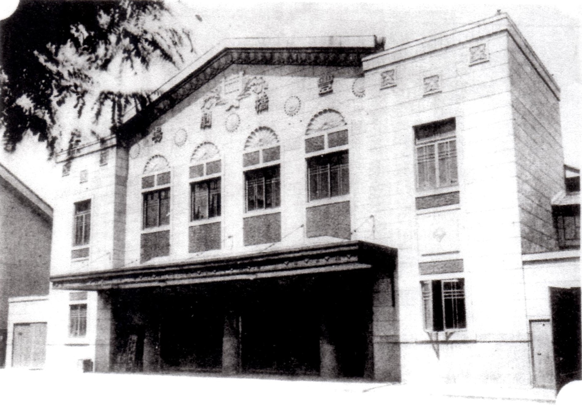 愛知県豊橋市にあった映画館「豊橋劇場」（1936年）。